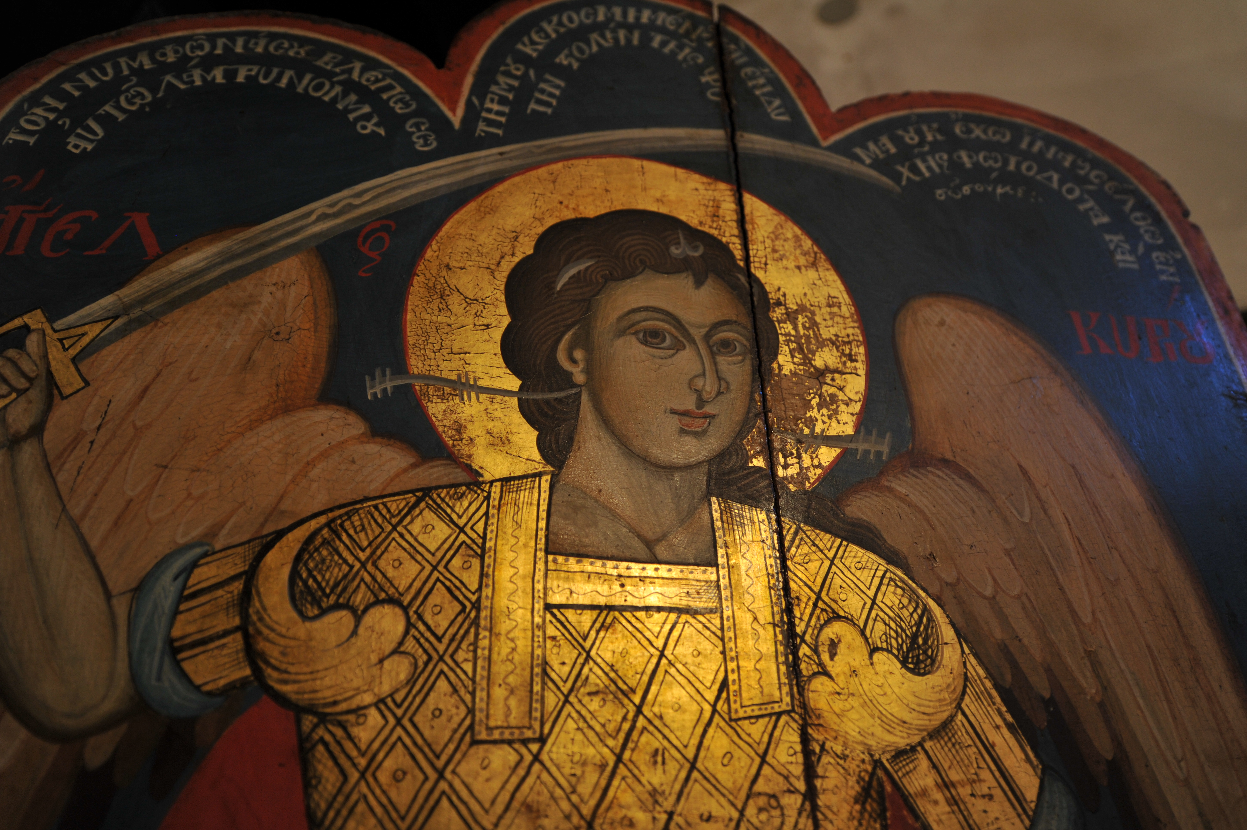 Kisha e Shën Todrit L ." Kala"